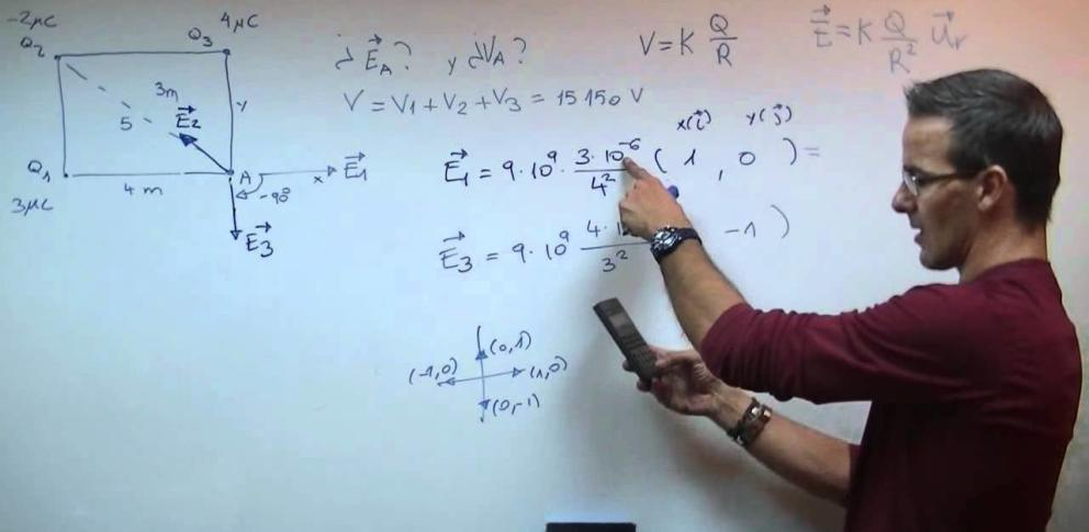 unicoos explicación